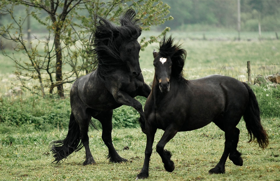 Nordsvensk - hingst - sto